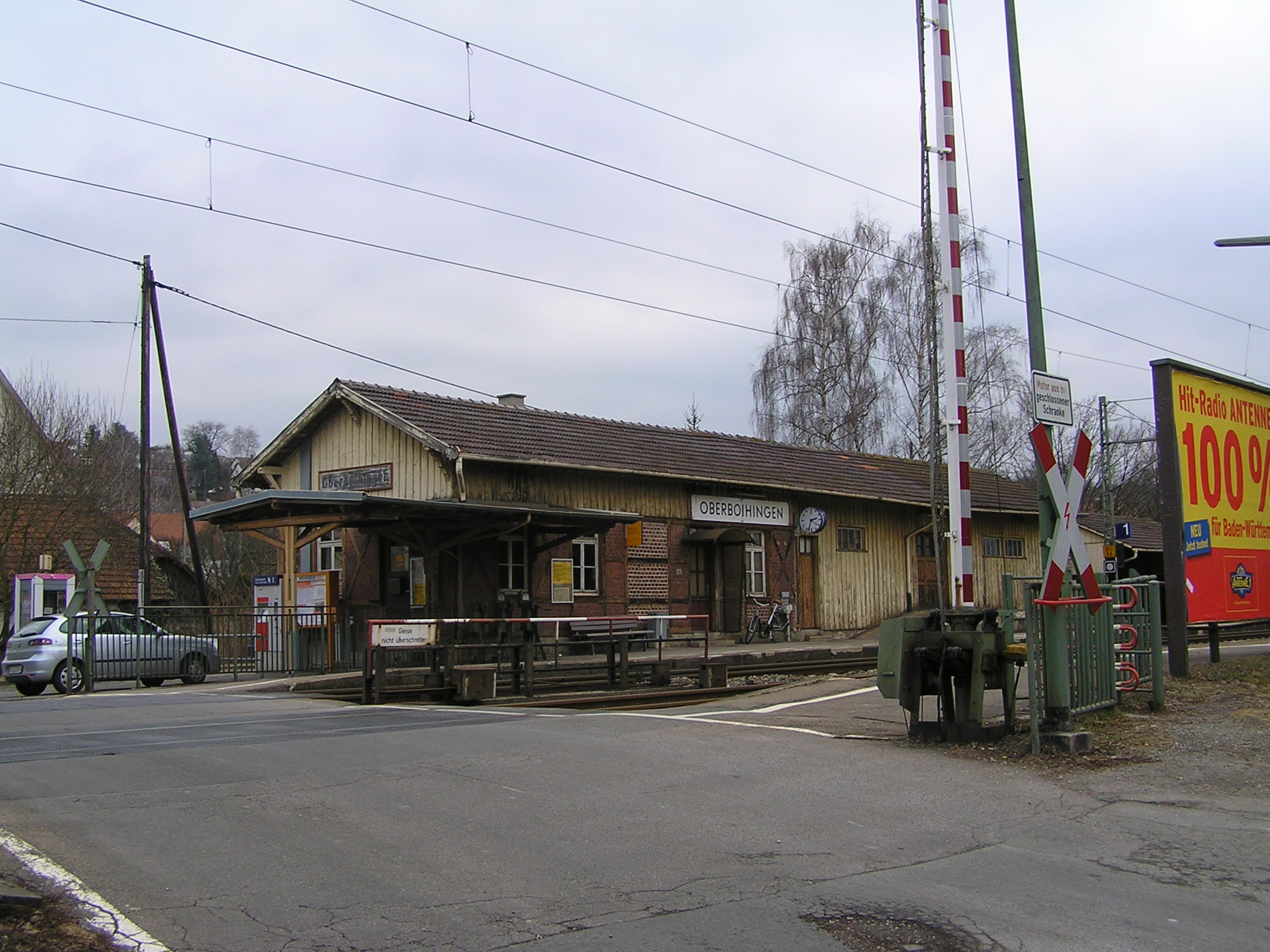 Bahnhof Oberboihingen, vermutlich letzte handbetriebene Schranke in Ba-Wü